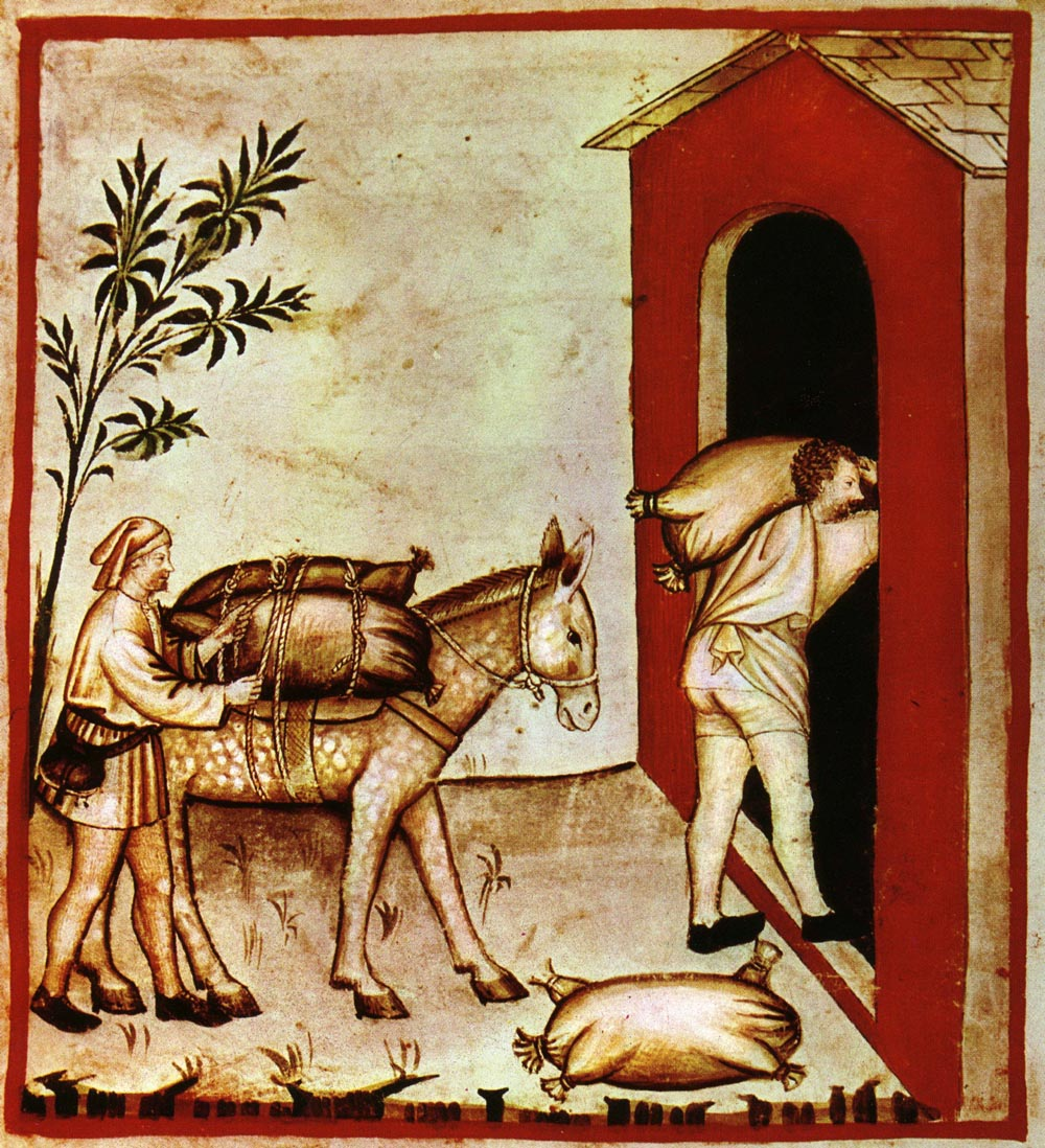 Tacuina sanitatis (XIV century) 1-alimenti, olio,Taccuino Sanitatis, Casanatense 4182.